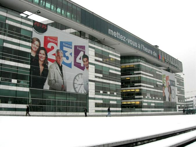 Штаб-квартира Радио Франции